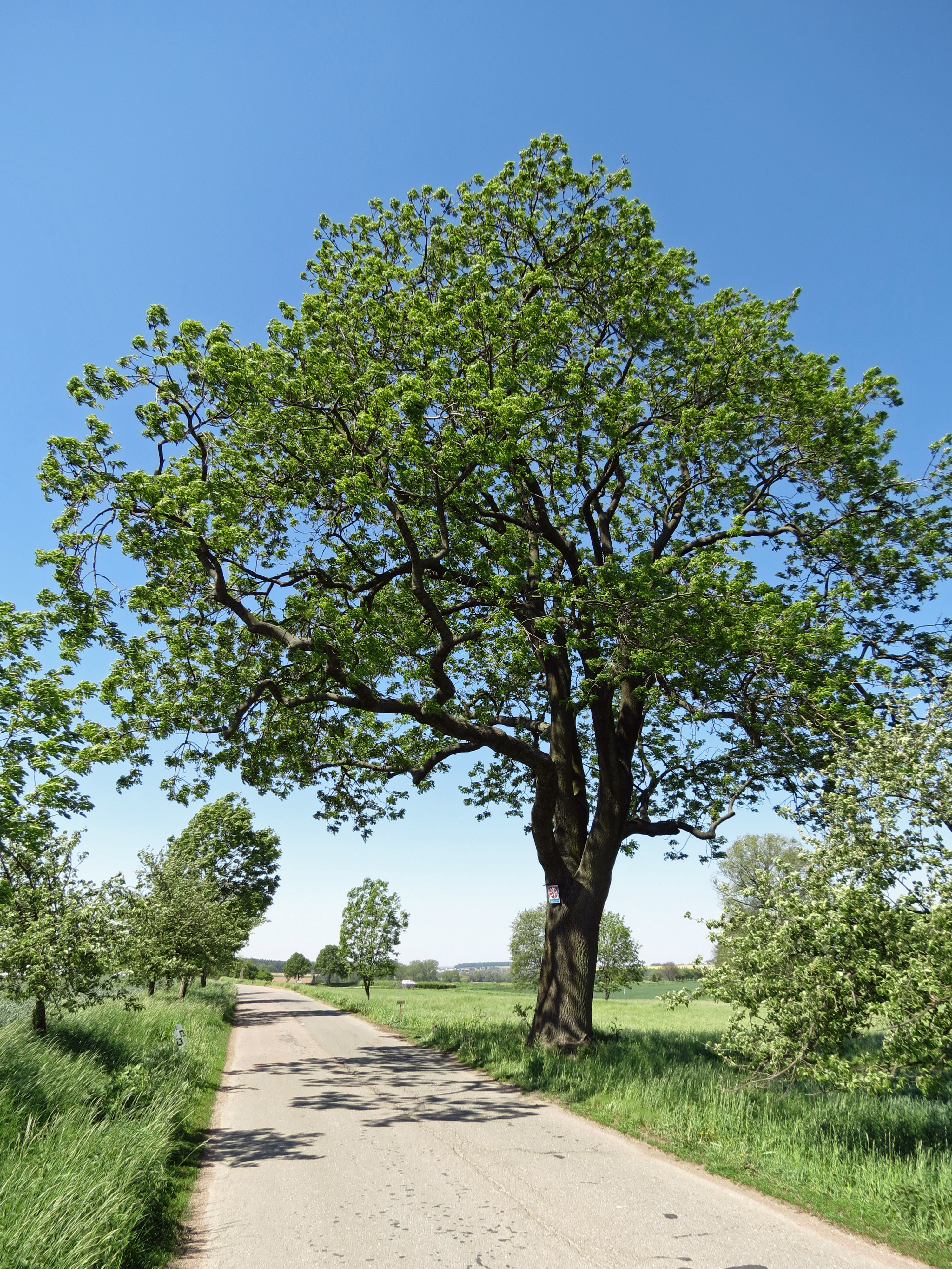 Jasan ztepilý v Čistěvsi